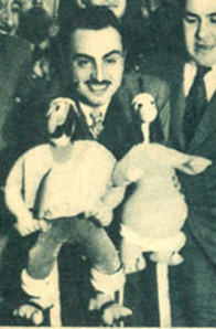 Dante Quinterno, historietista y empresario argentino. El pie de foto decía: Dante Quinterno con sus famosos muñecos Patoruzú y Upa. A su lado Billy Kerosene y otros colaboradores.